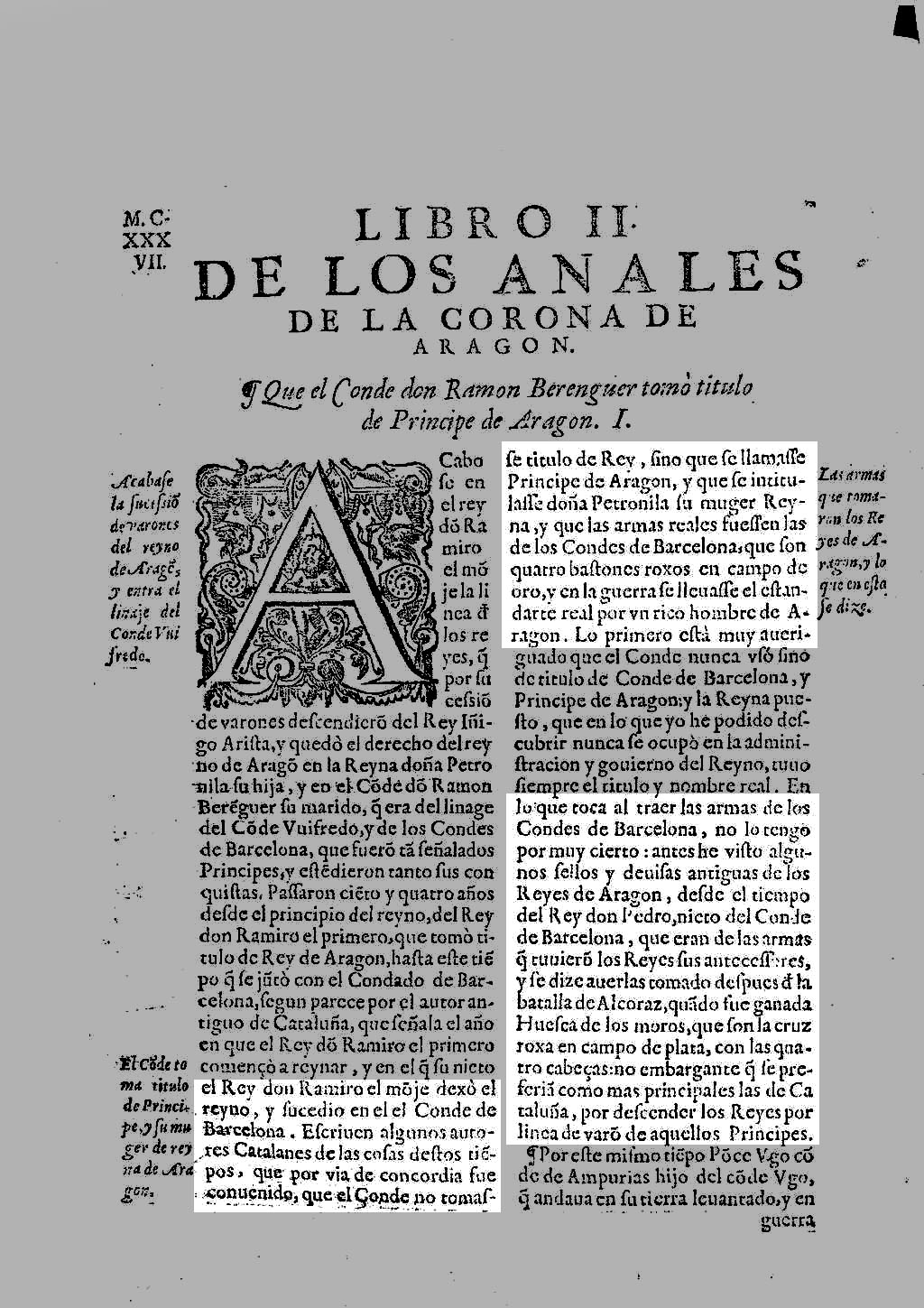 Senyera Reial d'Aragó-Armes de Catalunya